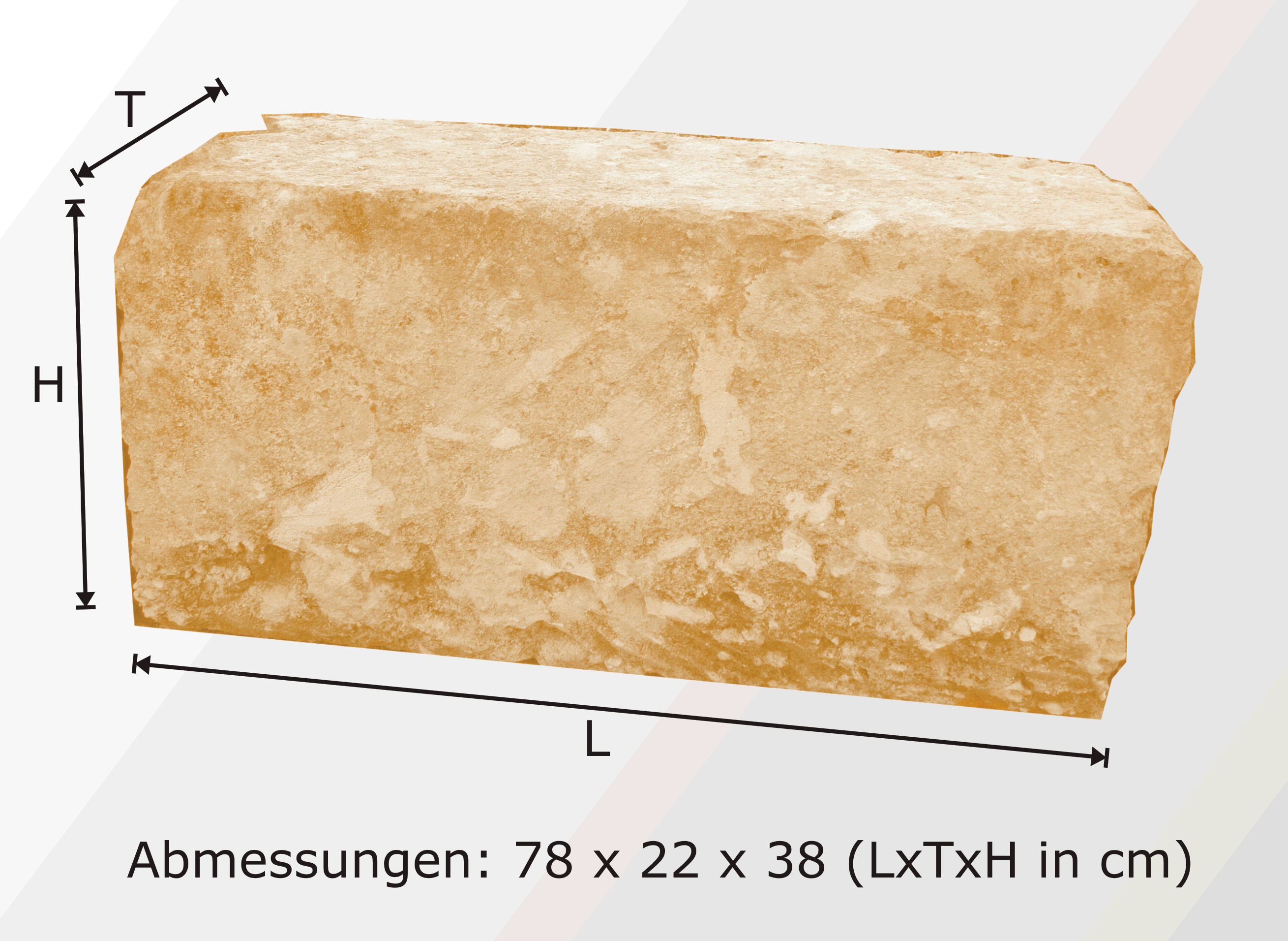 Standard Abmessung: Marès Block